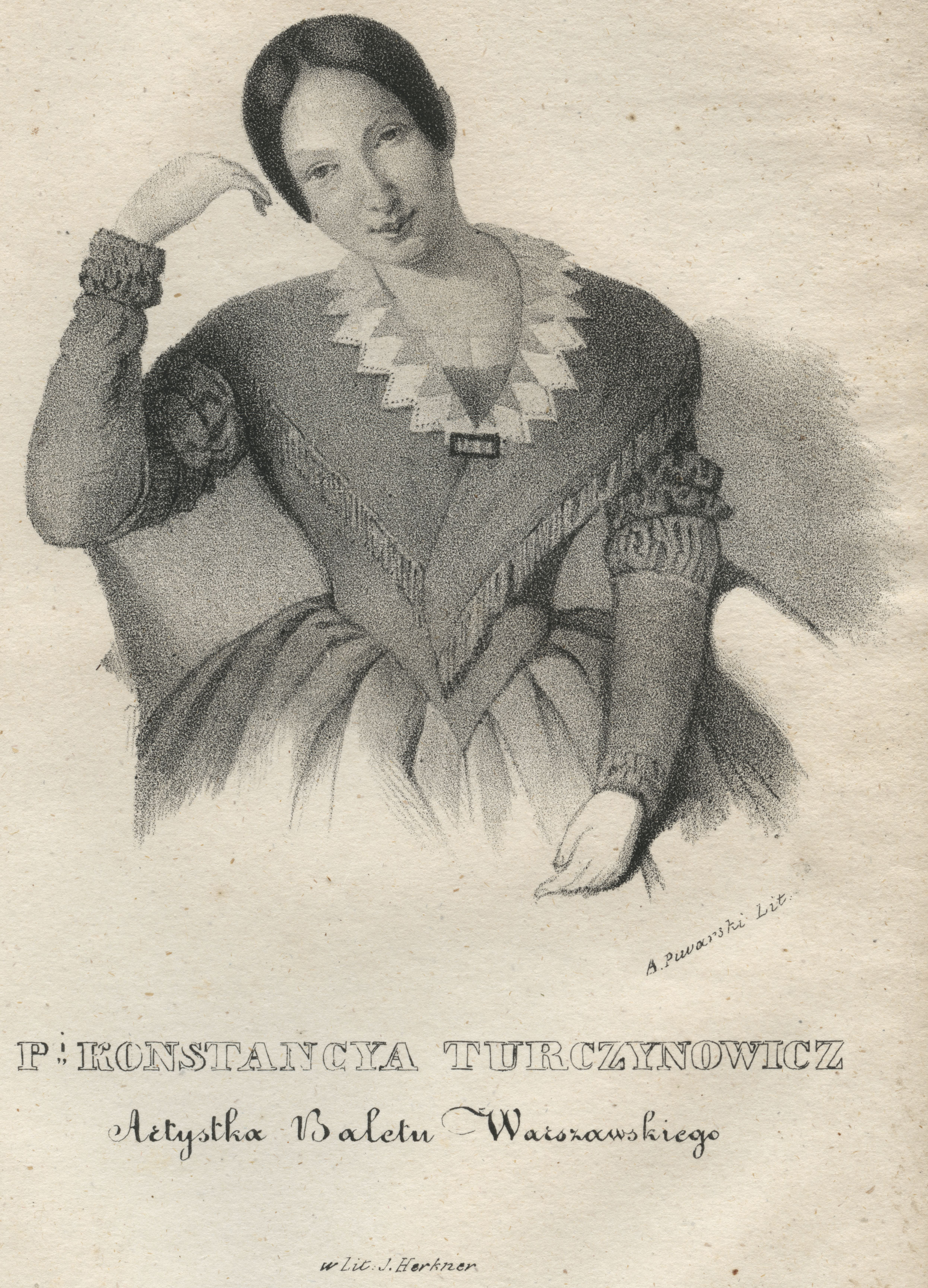 Konstancya Turczynowicz